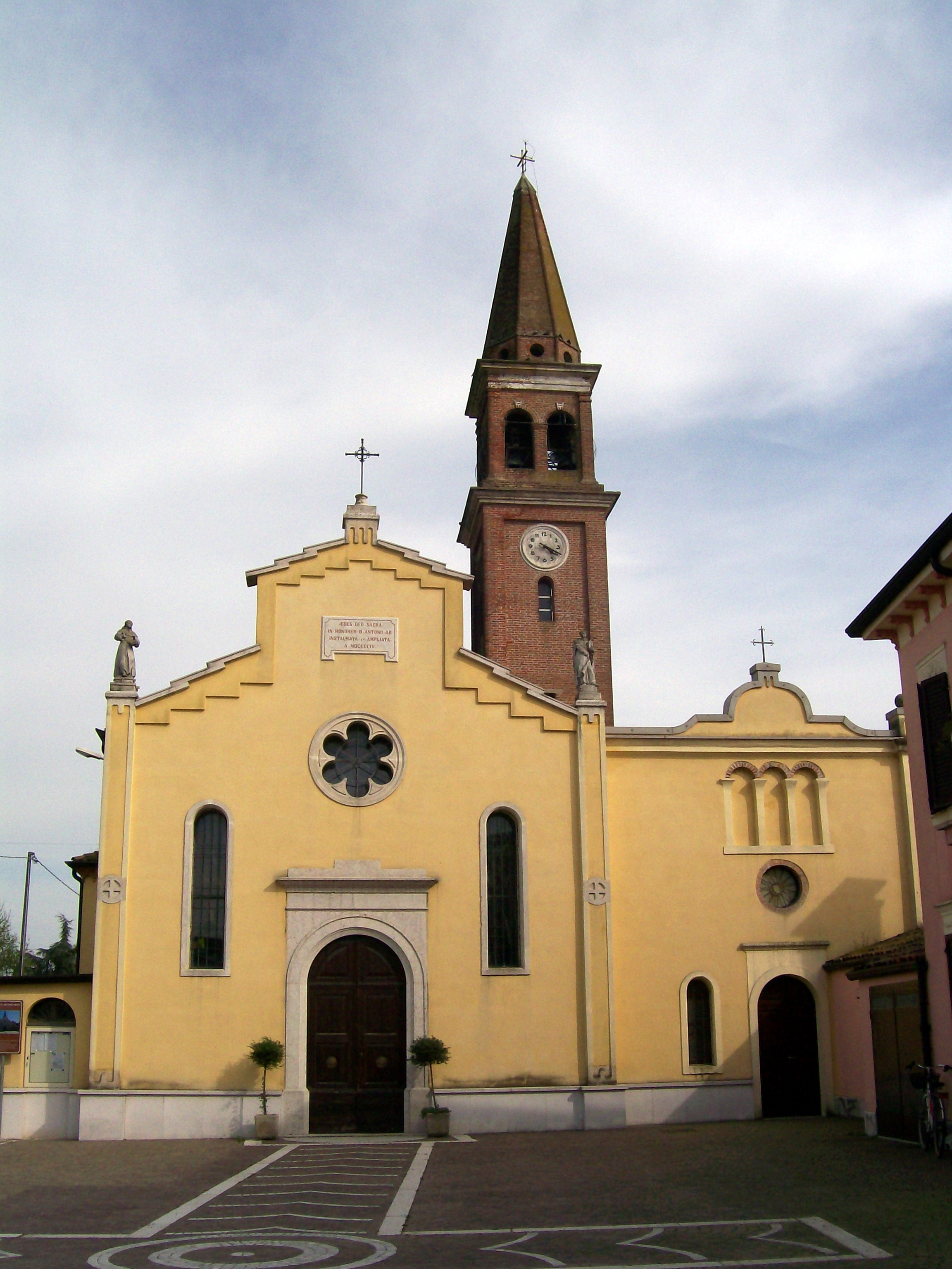 Miega, frazione di Veronella: chiesa parrocchiale di di Sant'Antonio Abate.